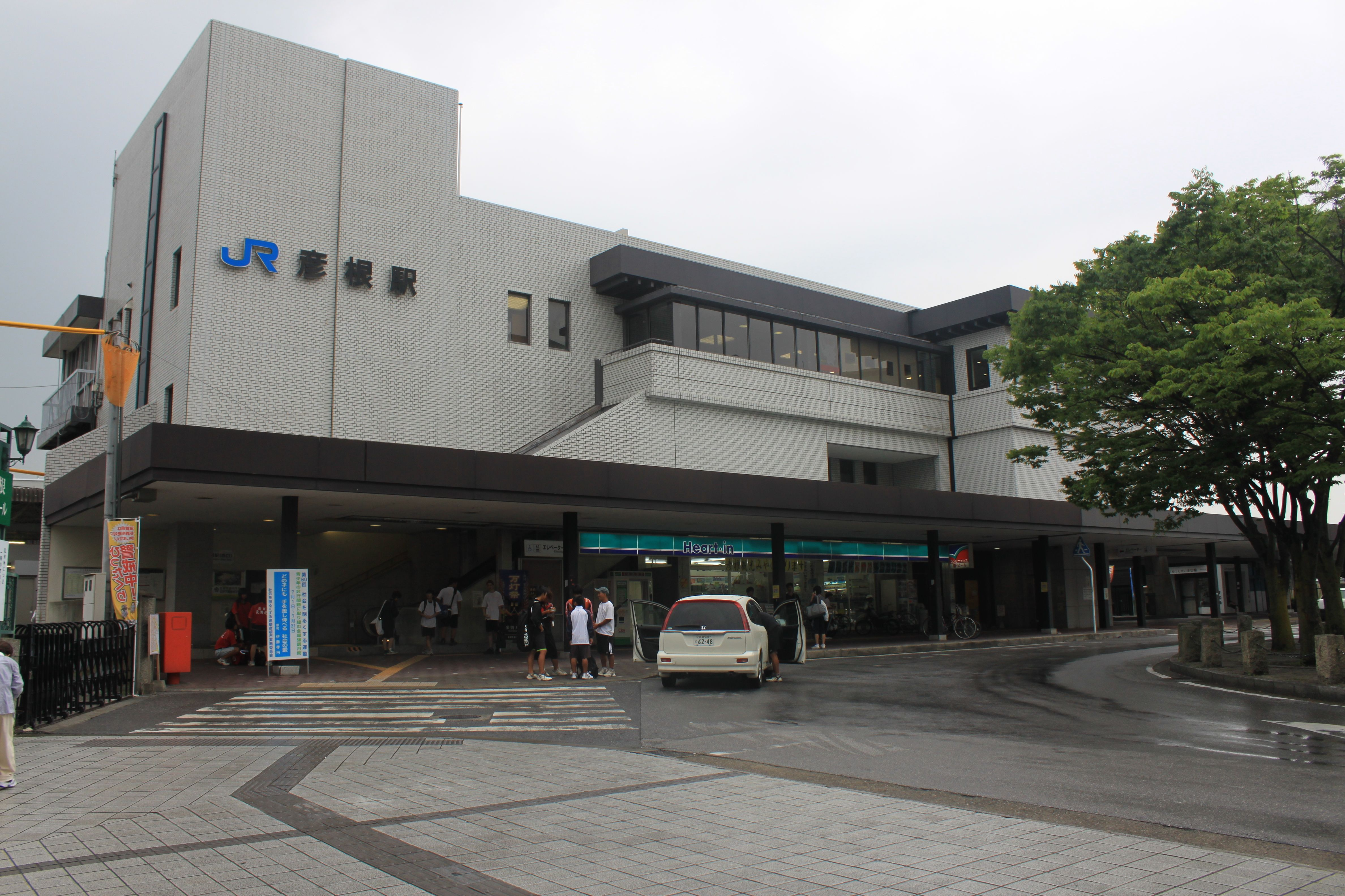 彦根駅